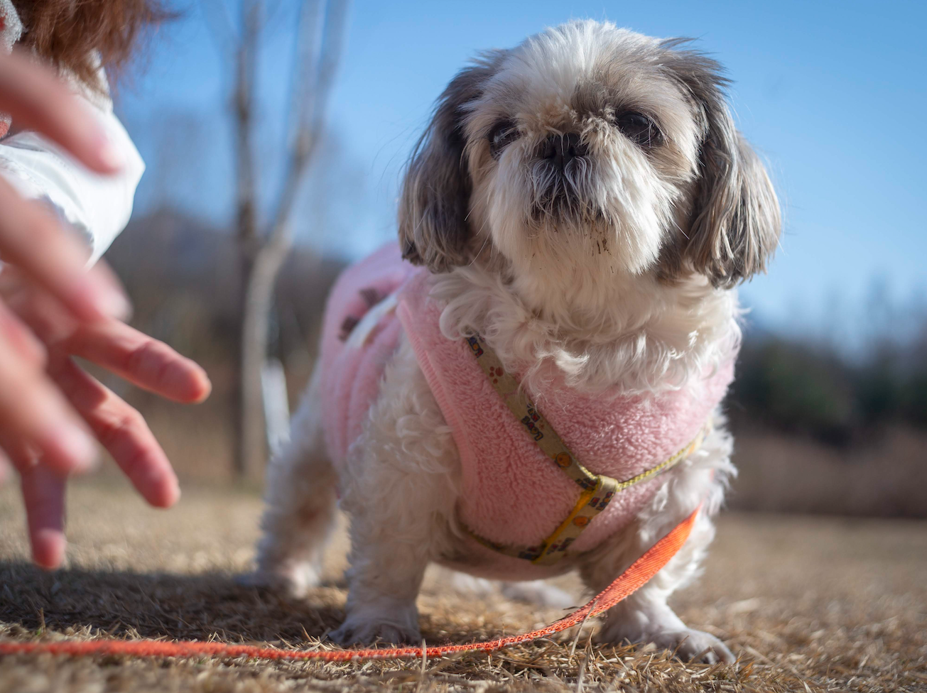 극적인 털 관리를 거치지 않은 보편적인 시추 강아지입니다.